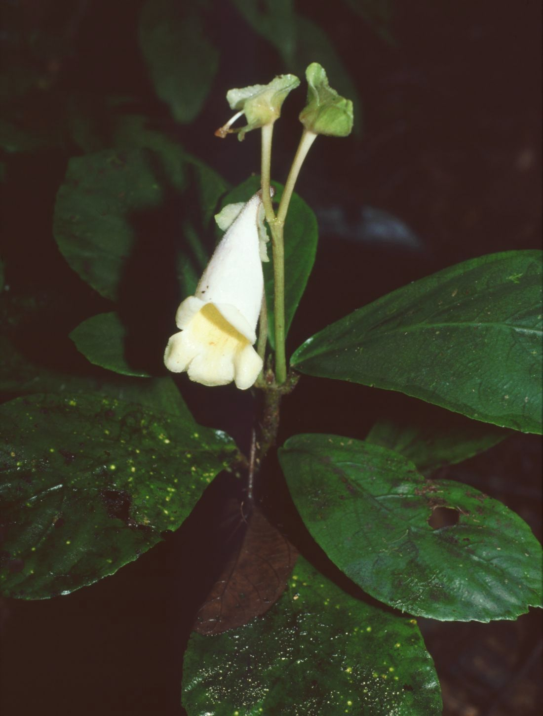 Gasteranthus delphinioides, Gesneriaceae - Costa Rica: Prov. Puntarenas, PN Piedras Blancas, Bosque Esquinas bei La Gamba, "Catarata Trail"